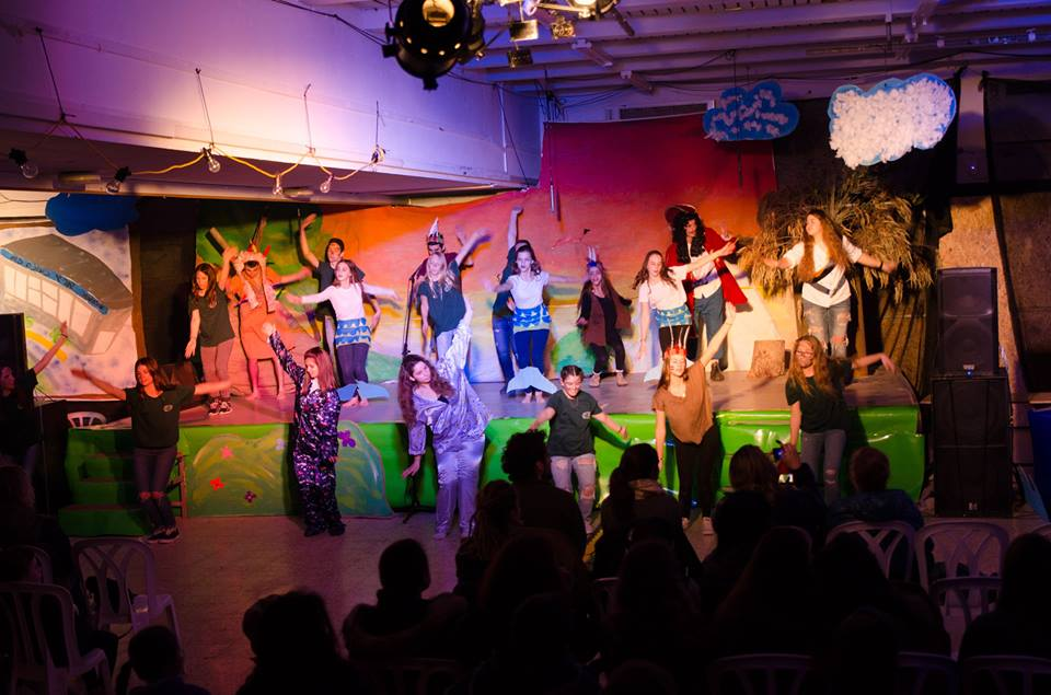 המחזמר פיטר פן שהעלו כלל חניכי רעות